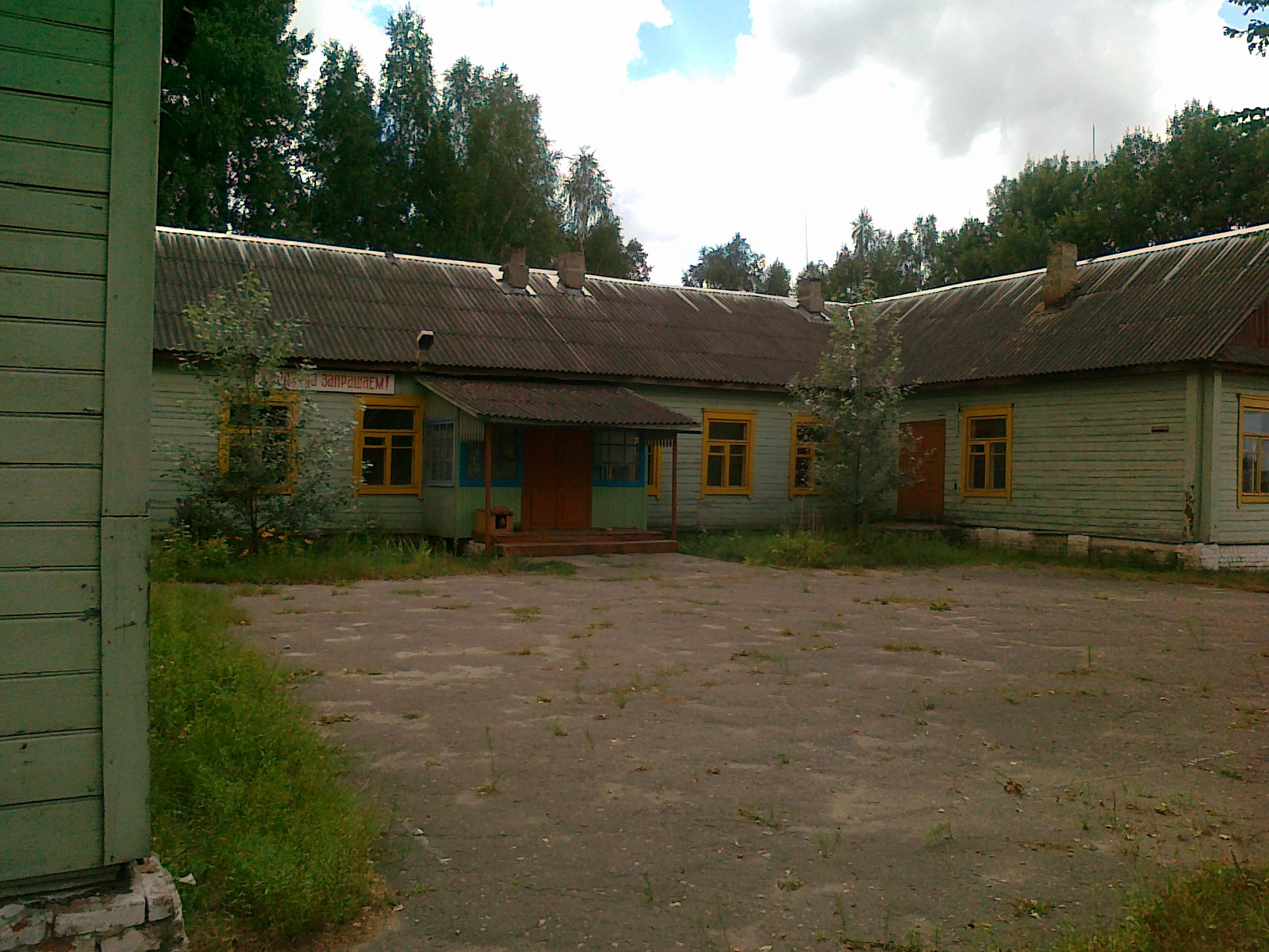 Плесская средняя школа